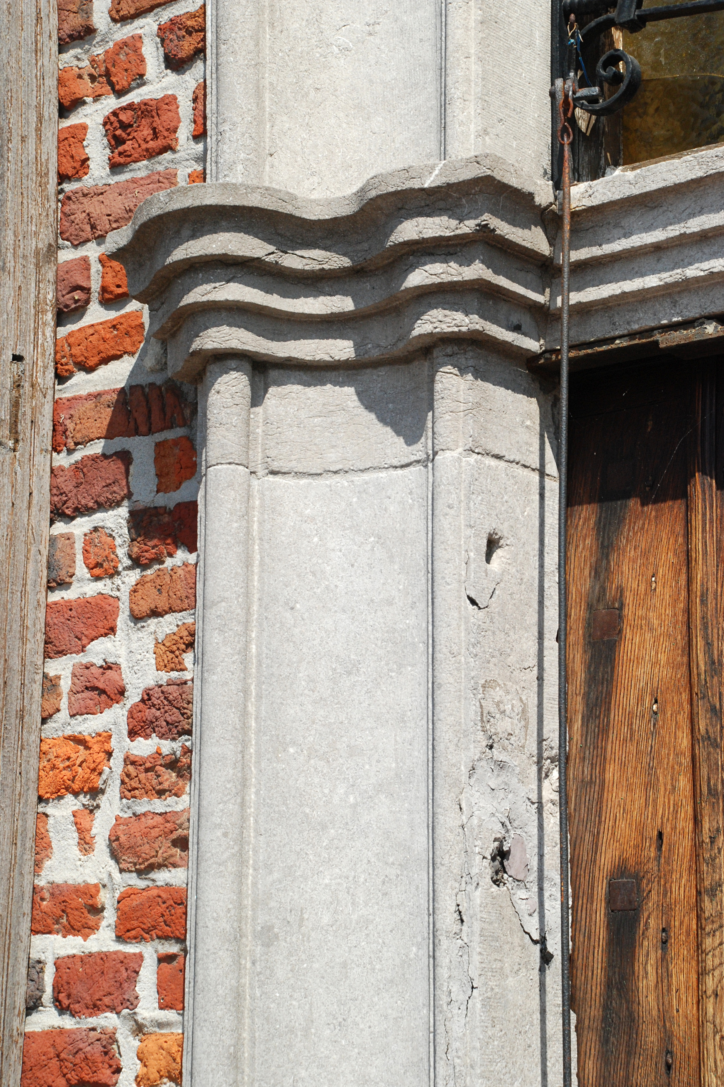 Belgique - Brabant wallon - Genappe - Auberge du Roy d'Espagne - porte de style Louis XV